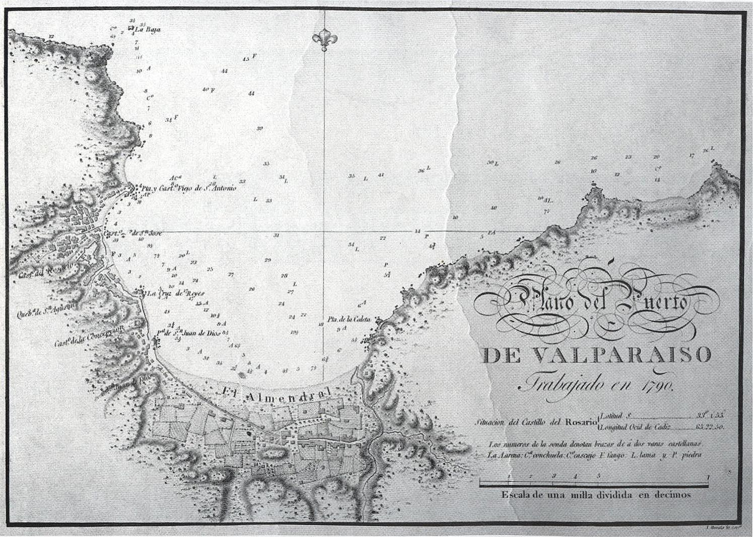 Plano del Puerto de Valparaiso Trabajado en 1790